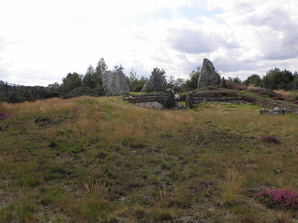 Tumulus du Château Bû à Saint-Just (35).